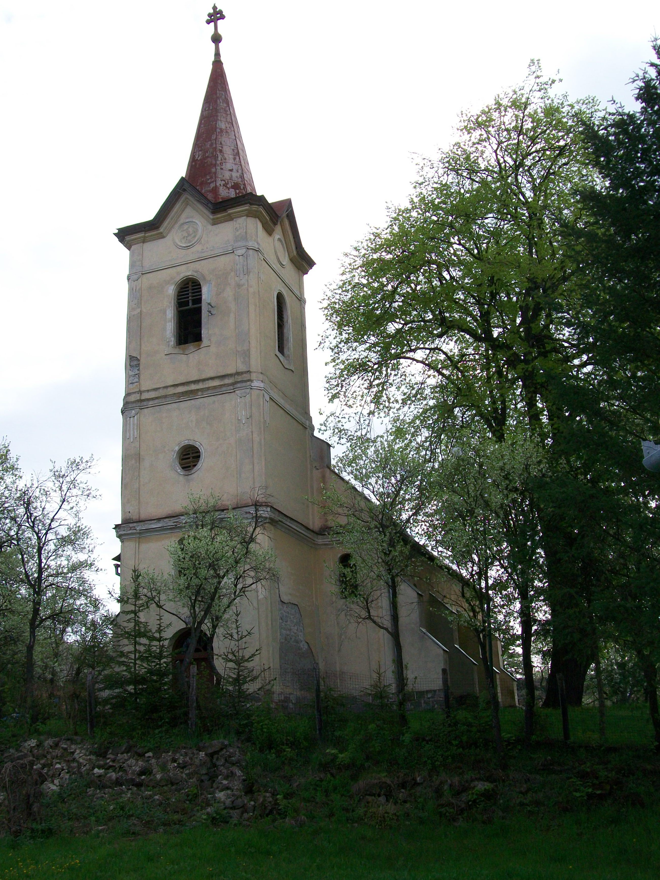 Kostol pochádza zo 14. storočia, upravovaný bol v 17. storočí. V interiéri sa zachovali cenné nástenné maľby zo 14. storočia.